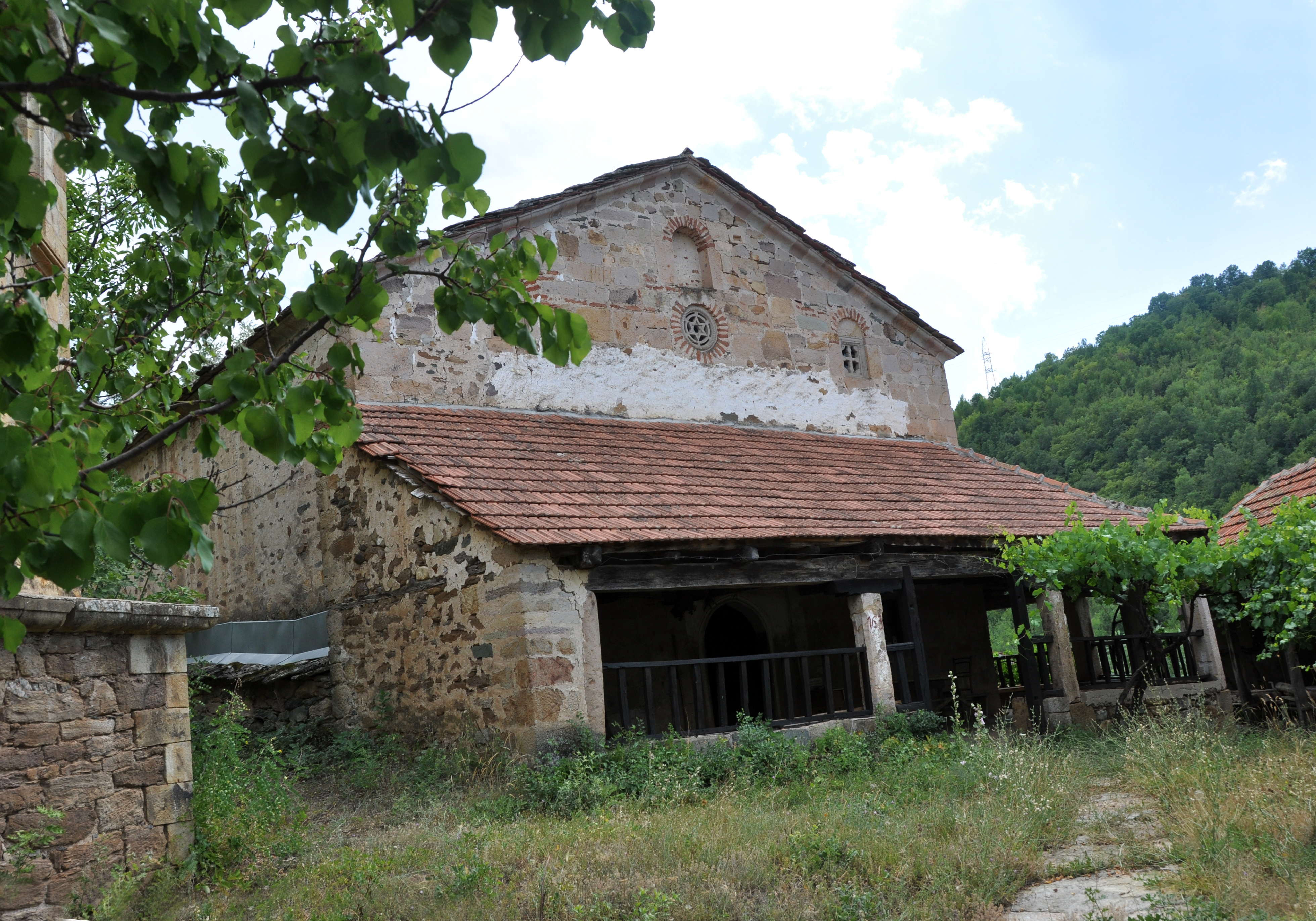 Црква Свети Никола село Опила